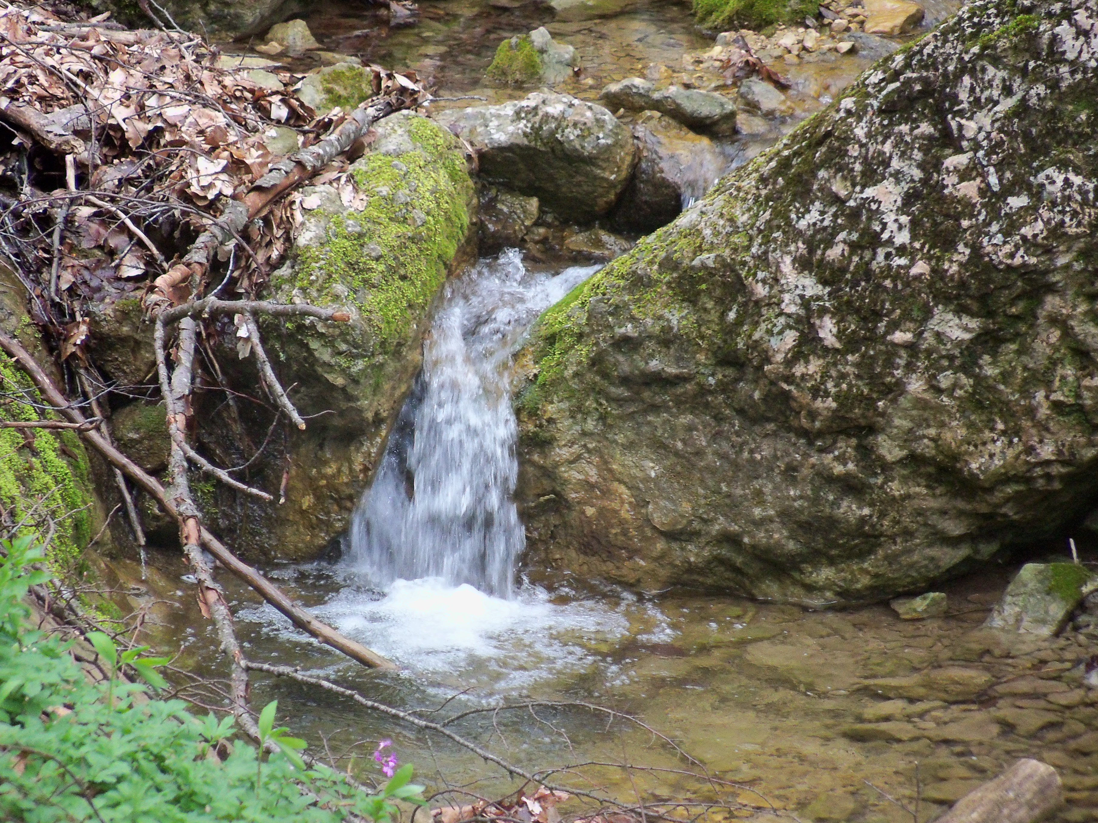 Река Чаан-Баир